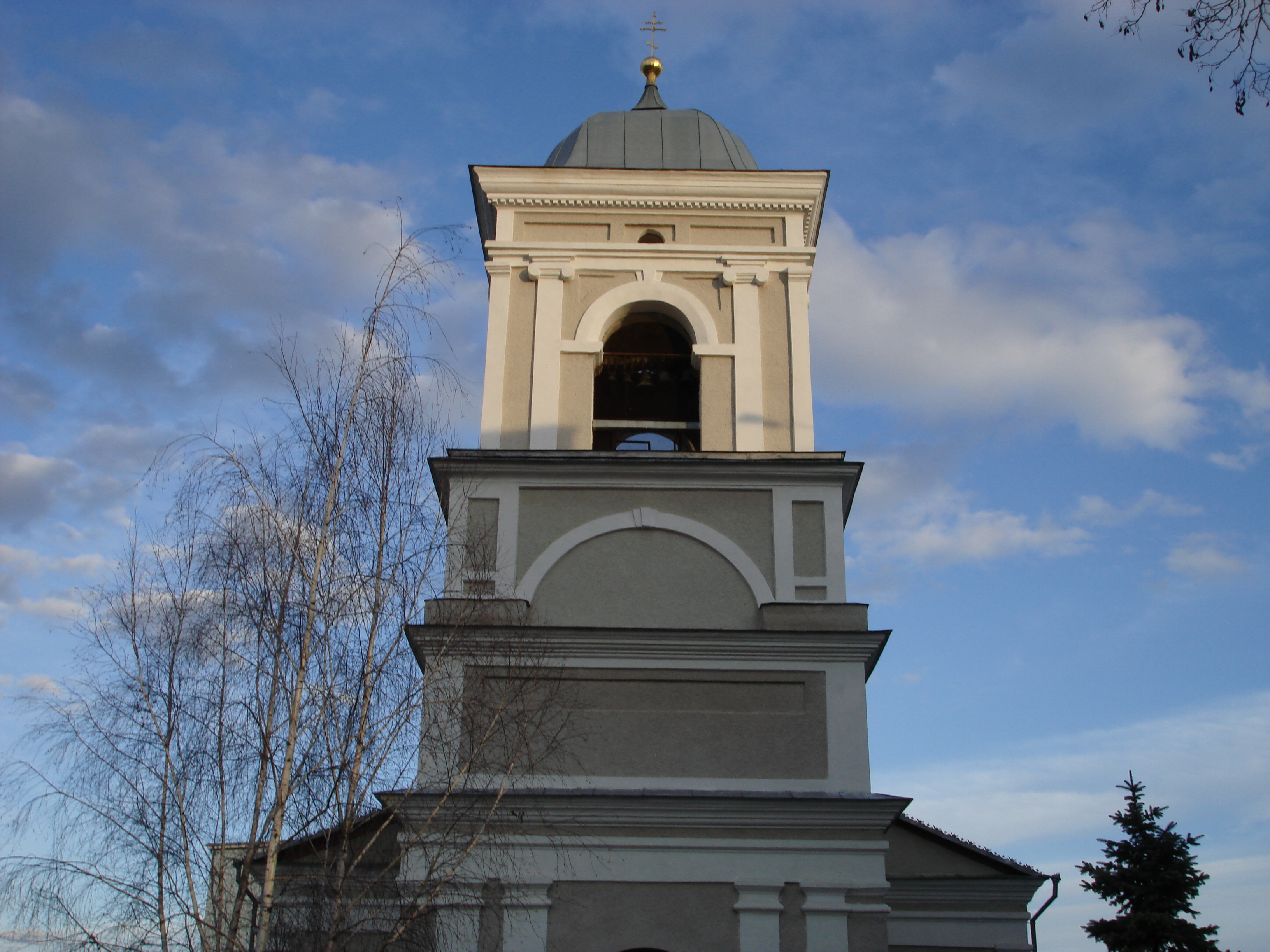 Преображенский собор в Бендерах